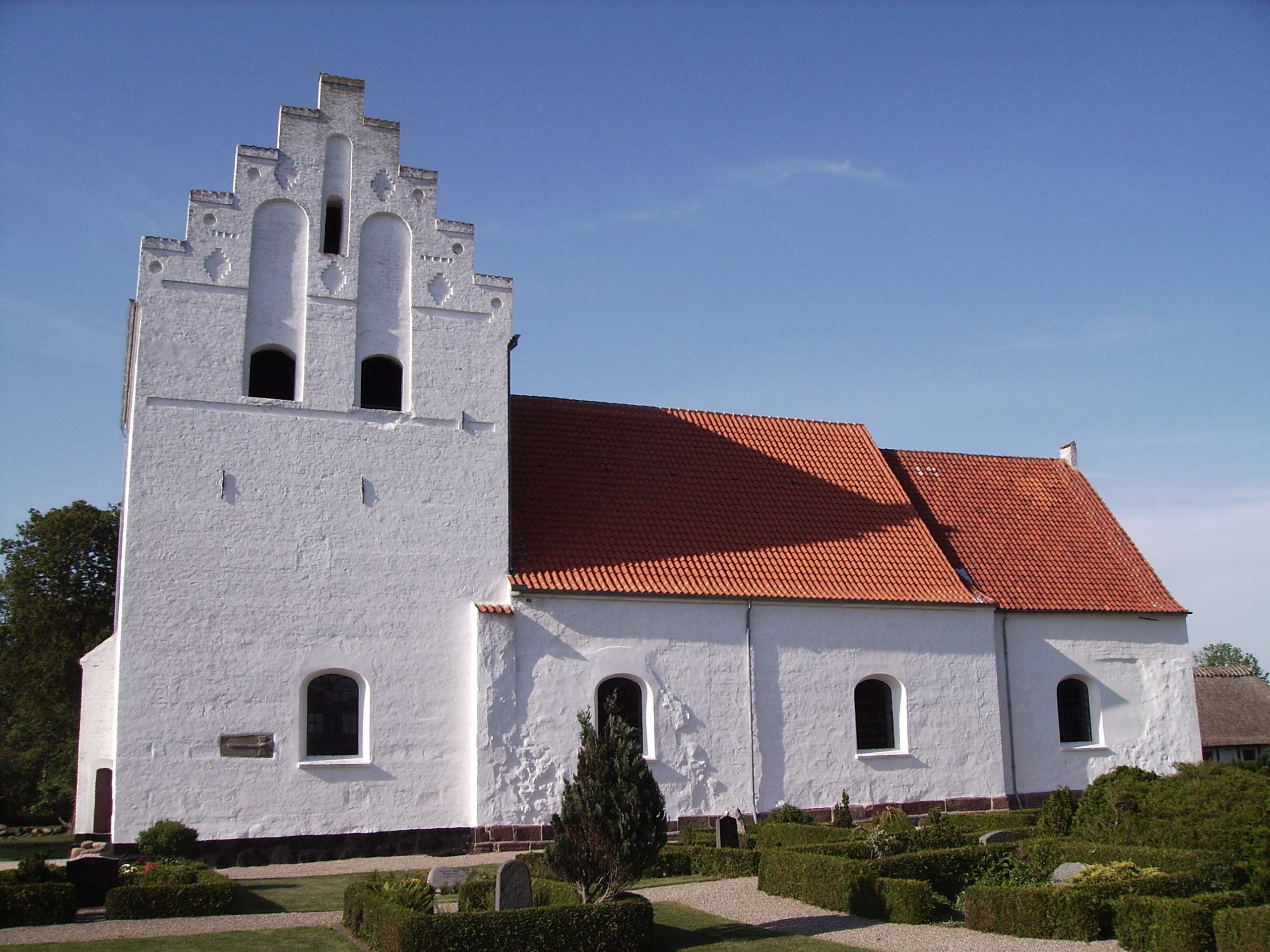 Kølstrup Kirke, Kølstrup Sogn, Bjerge Herred, Odense Amt, Denmark (Danish Church) - Kølstrup Kirke fra syd